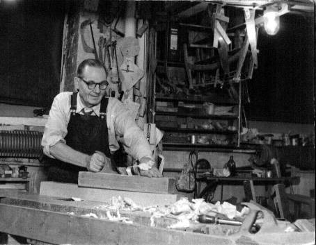 Master Carpenter Väinö Lahtinen at work